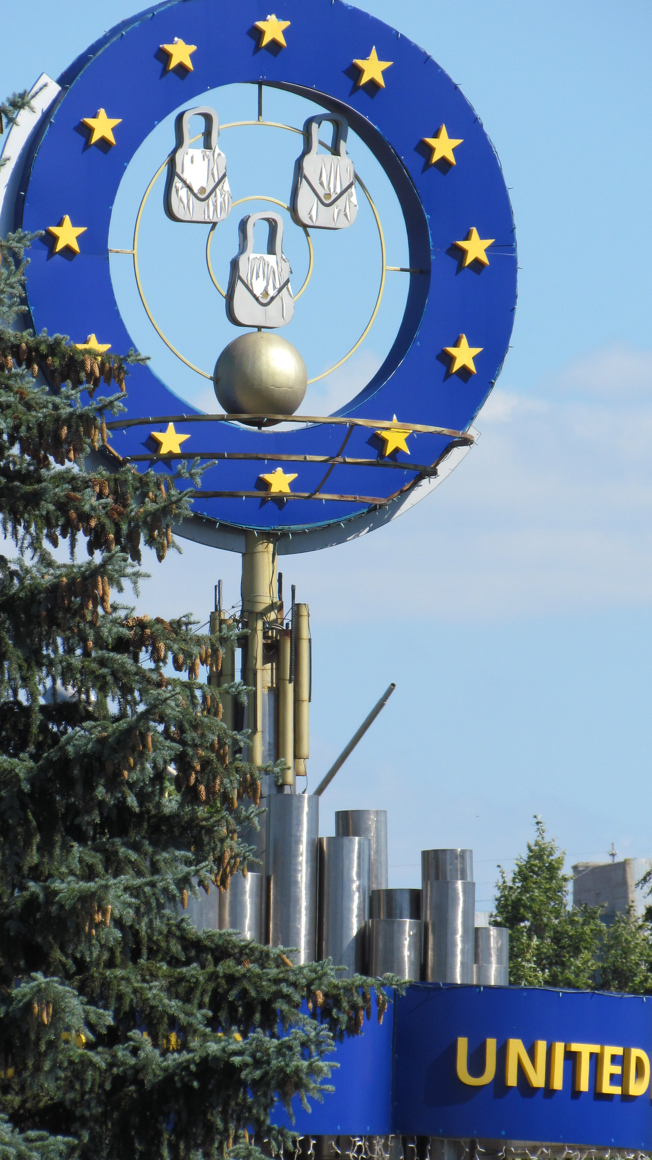 Пам'ятний знак на честь міст-побратимів міста Суми